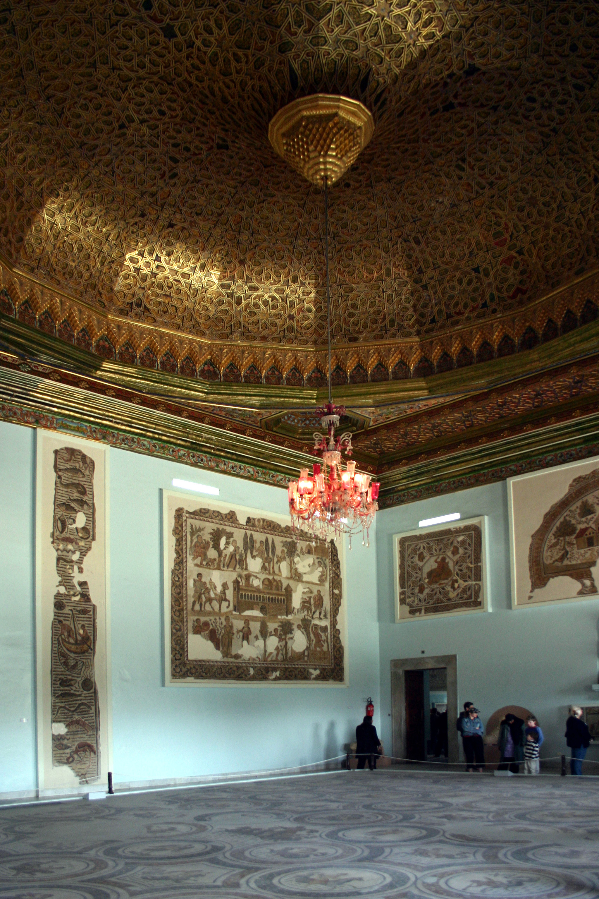 Salle du Musée du Bardo (Tunisie)